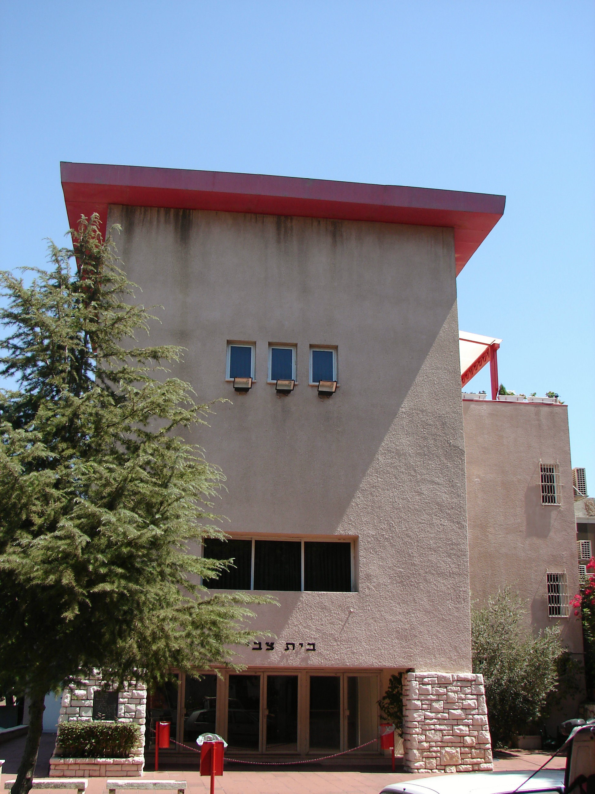 Beit Zvi Drama School, Ramat Gan, Israel